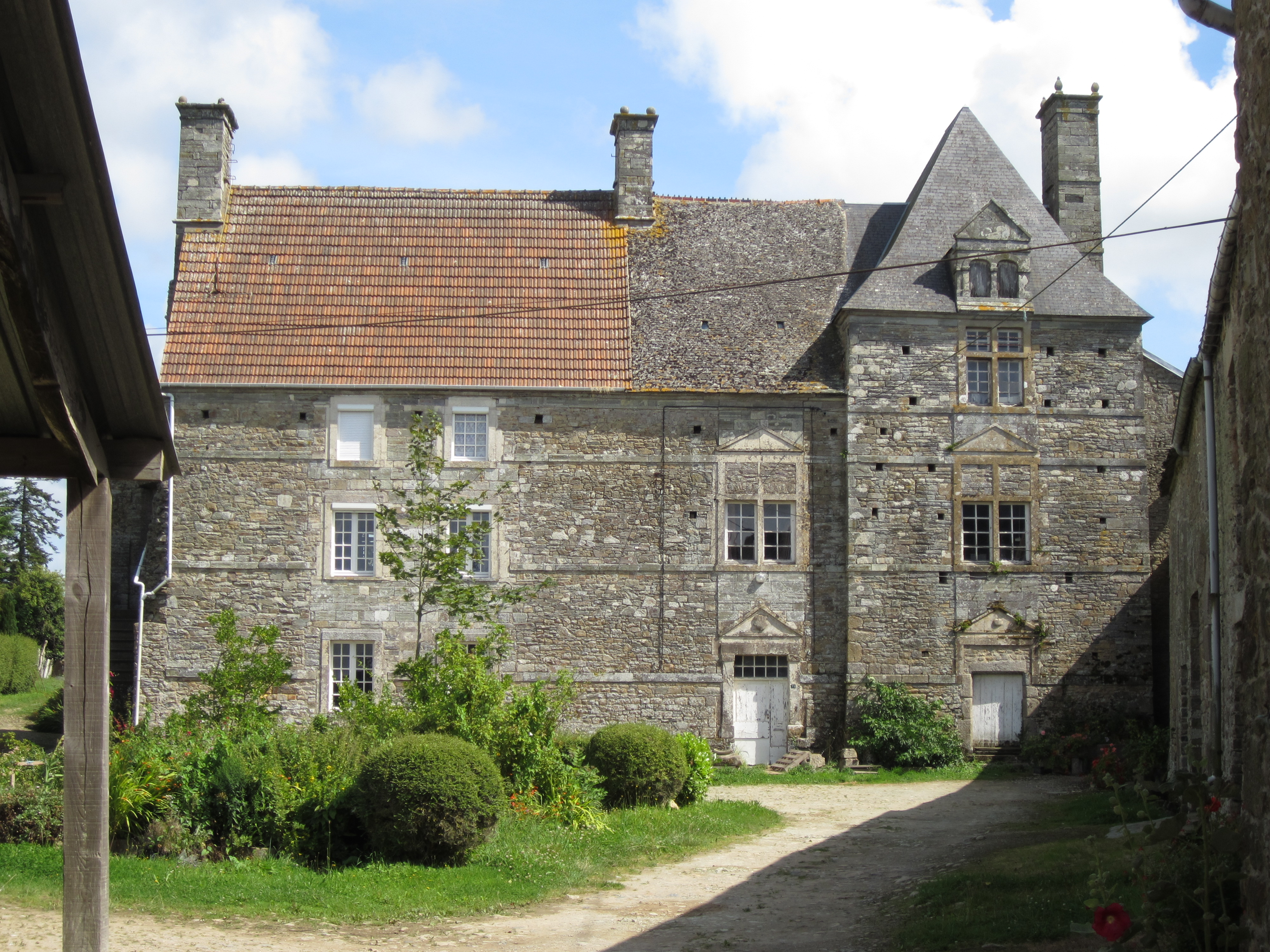 Manoir de Saint-Marcouf, Pierreville (Manche) .